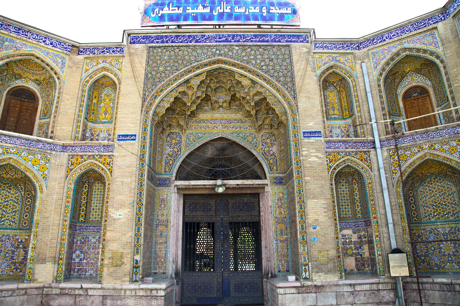 مسجد سپهسالار (مسجد شهید مطهری)